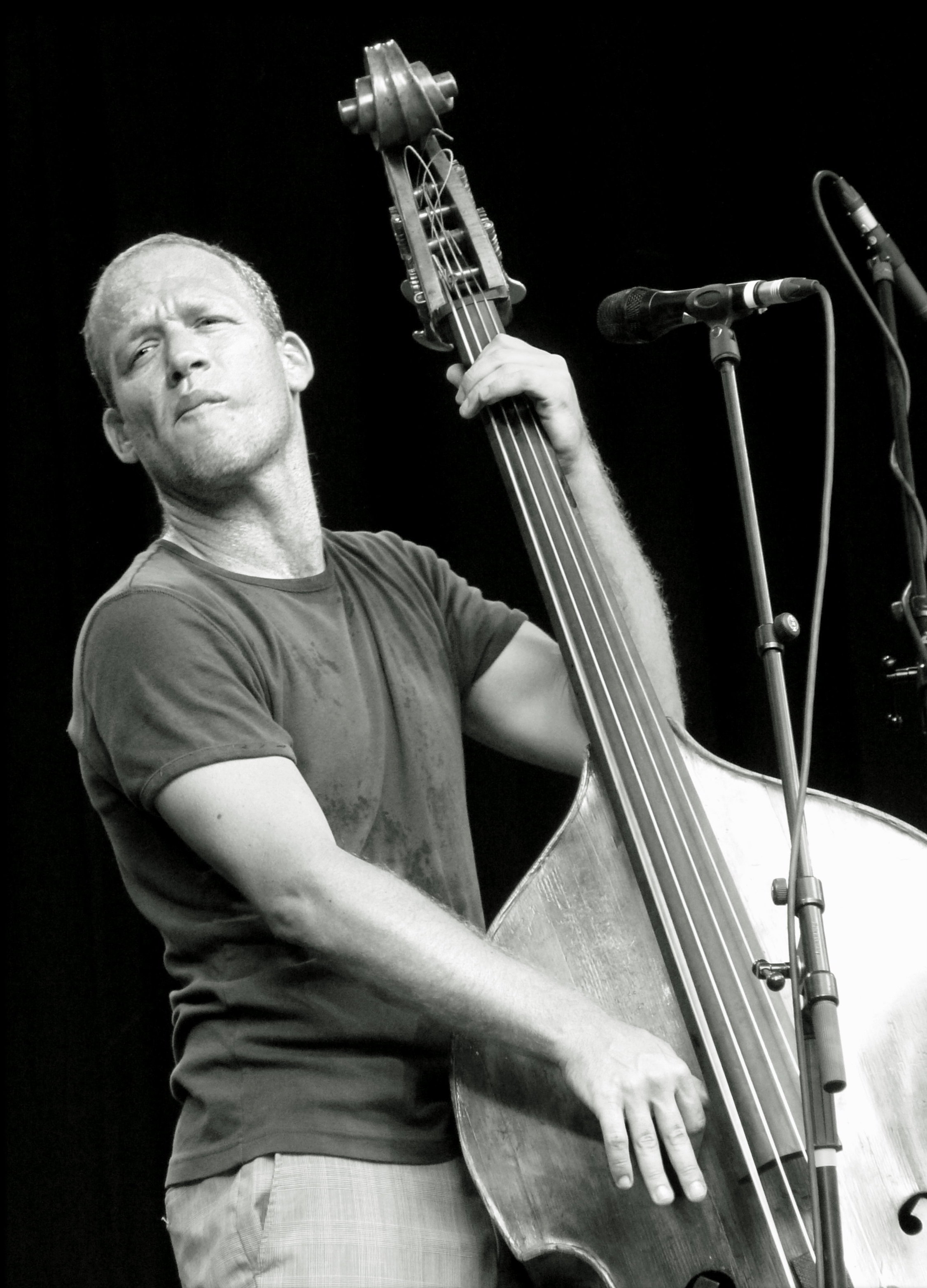 Avishai Cohen lors du concert donné au Brosella Folk et Jazz 2010.